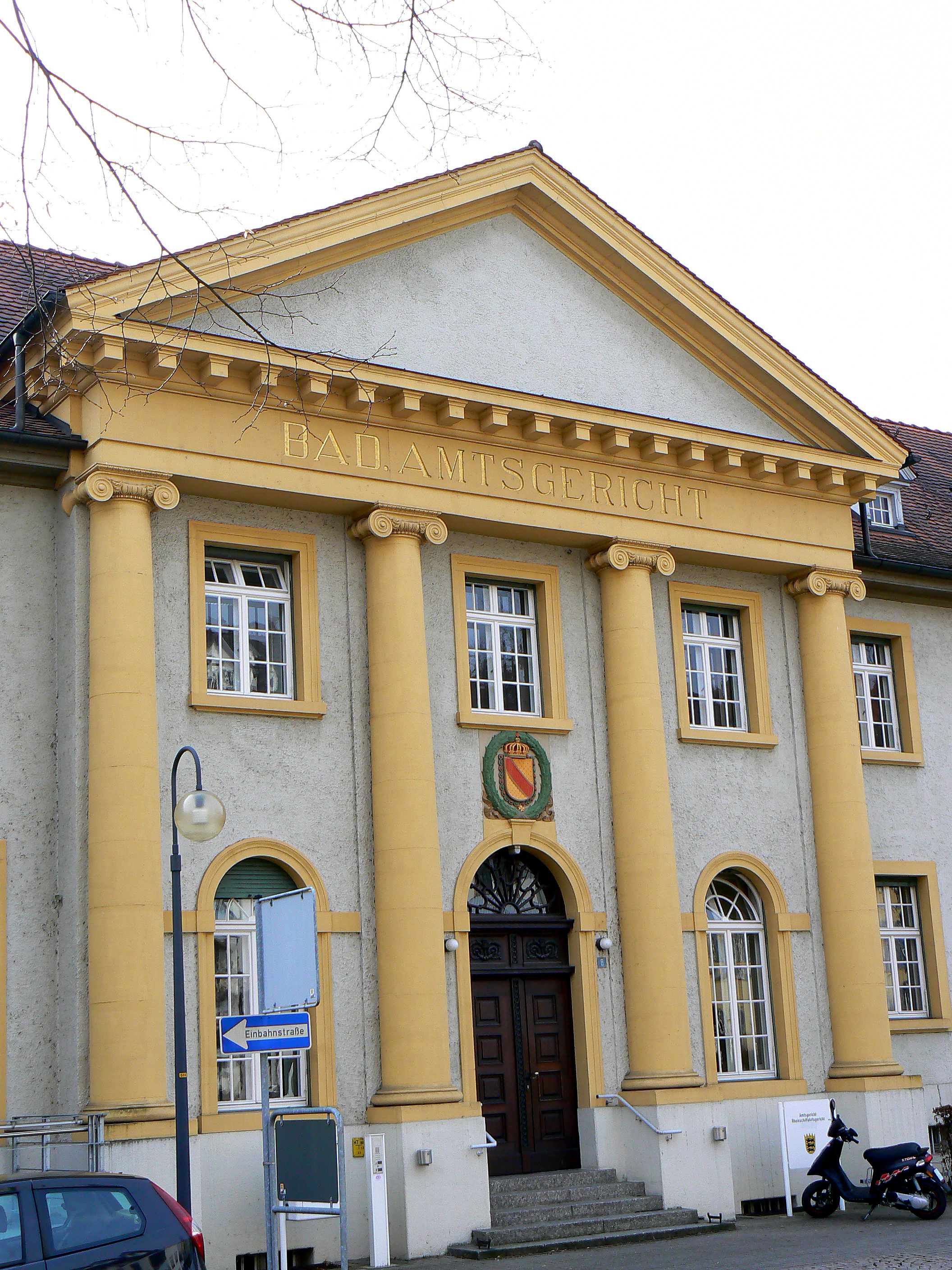 Einbahnstraße